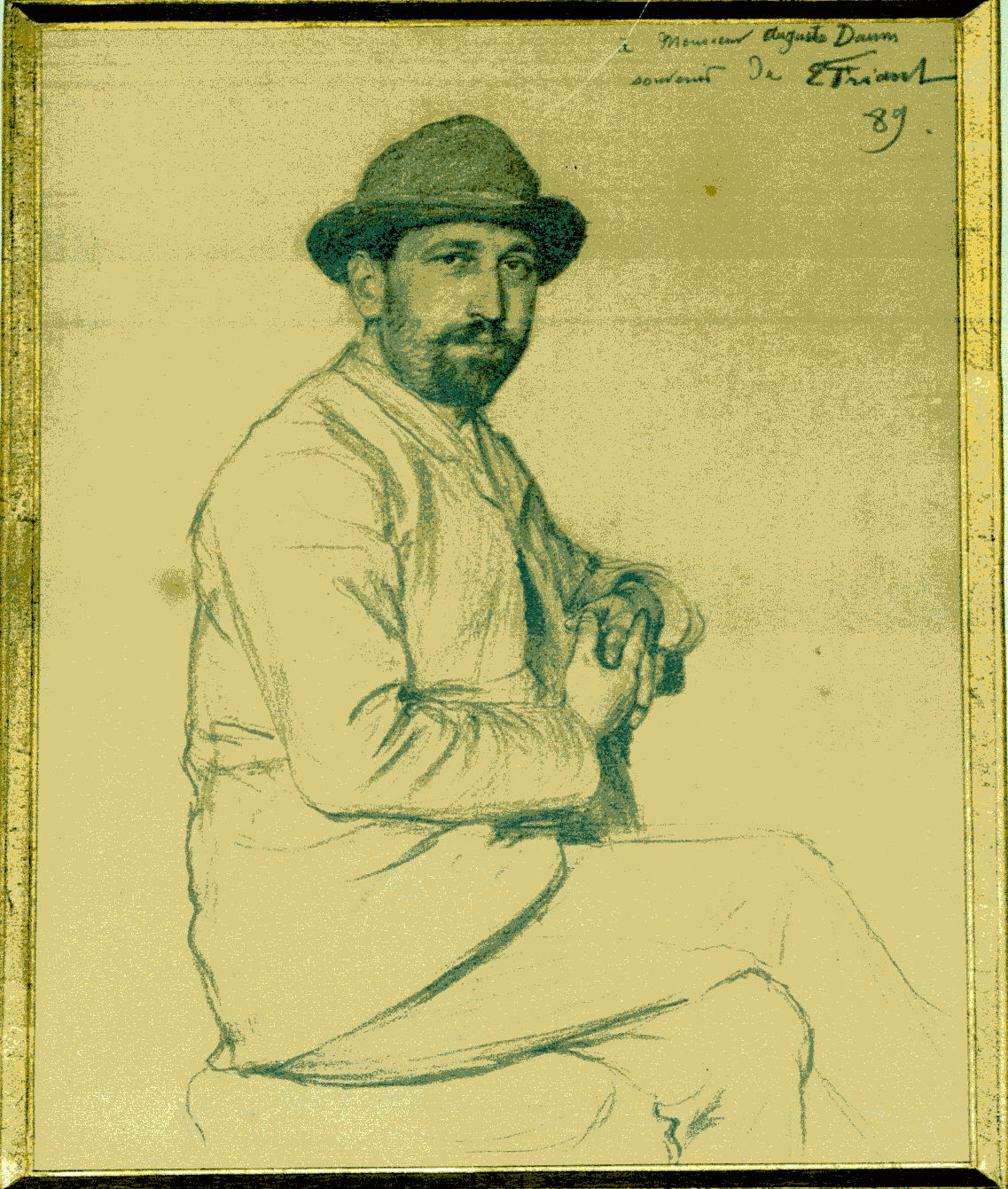 Auguste Daum par Émile Friand